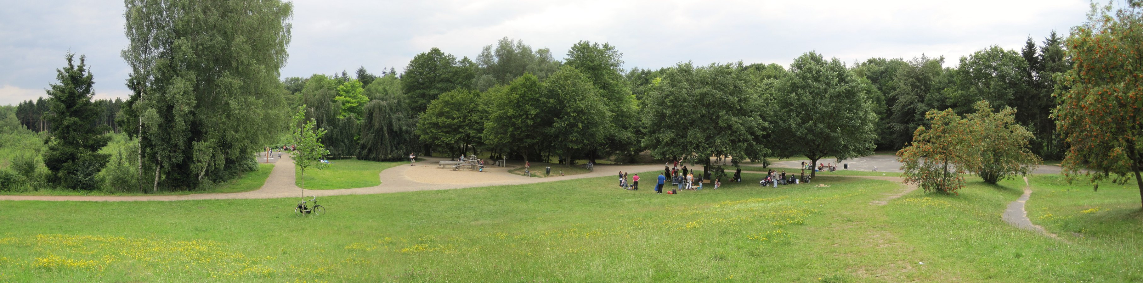 Freizeitanlage Diepeschrather Mühle